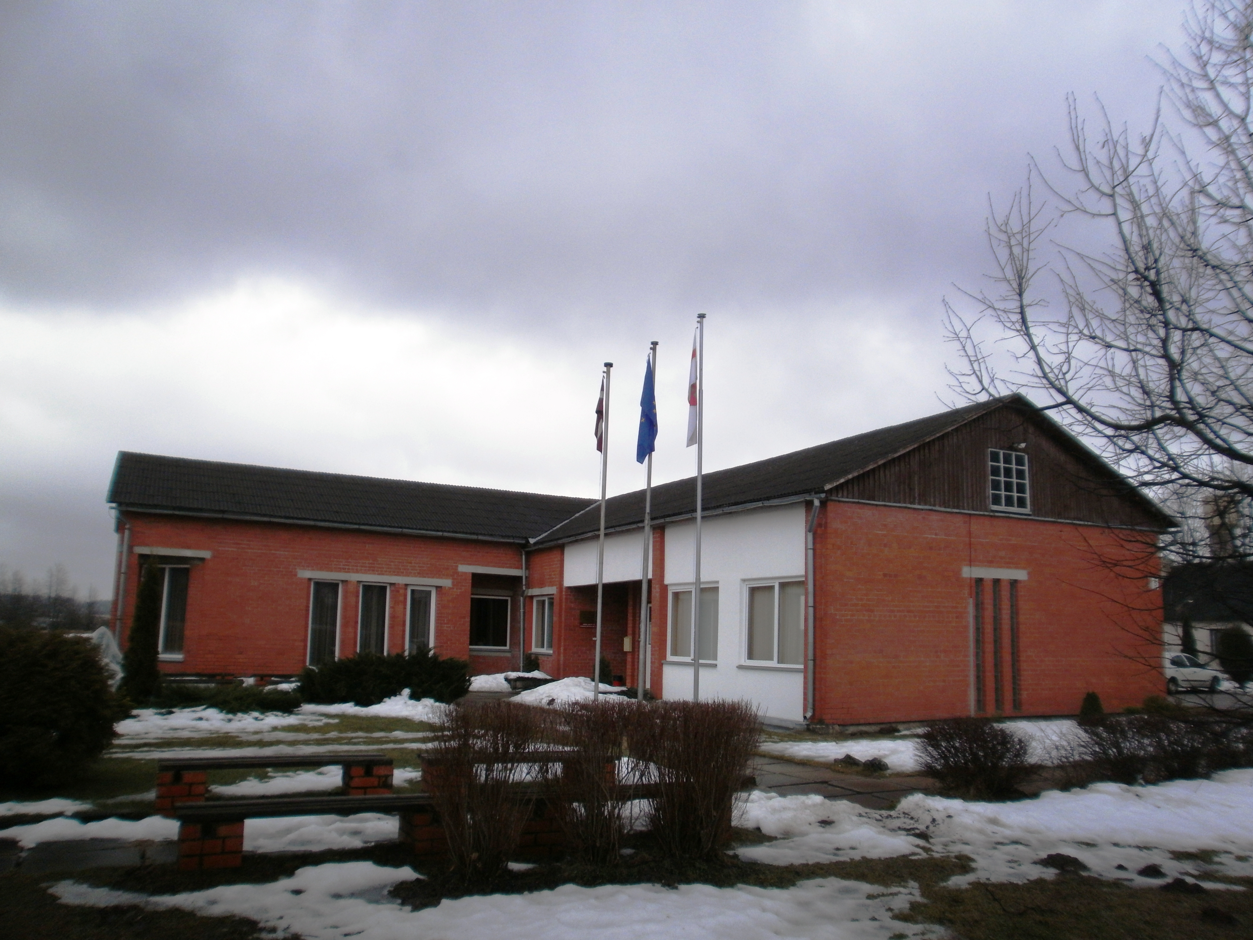 Kūku pagasta pārvalde.